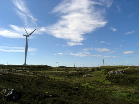 Fra vindmølleparken på Smøla